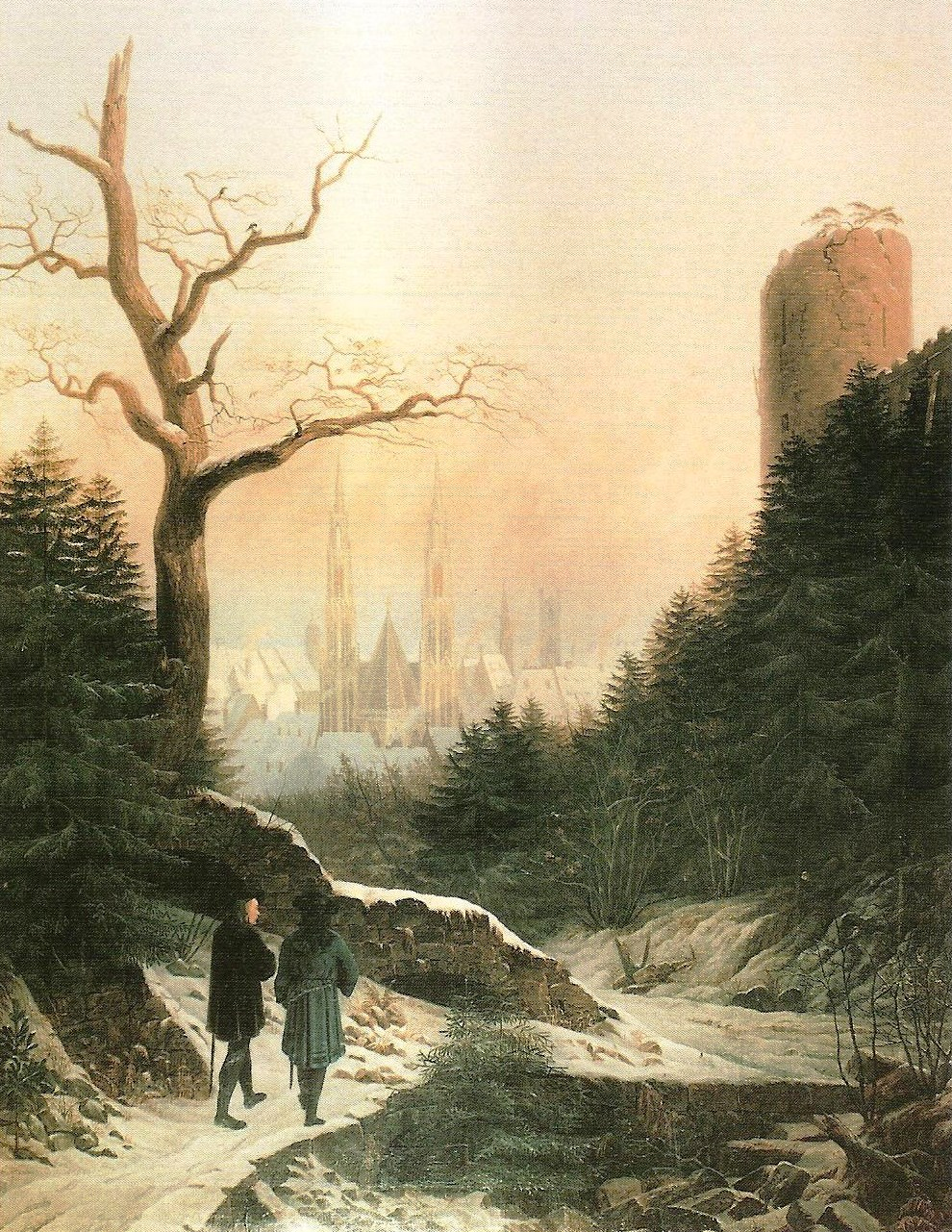 Winterlandschaft mit gotischer Kirche, Öl auf Leinwand, 1821